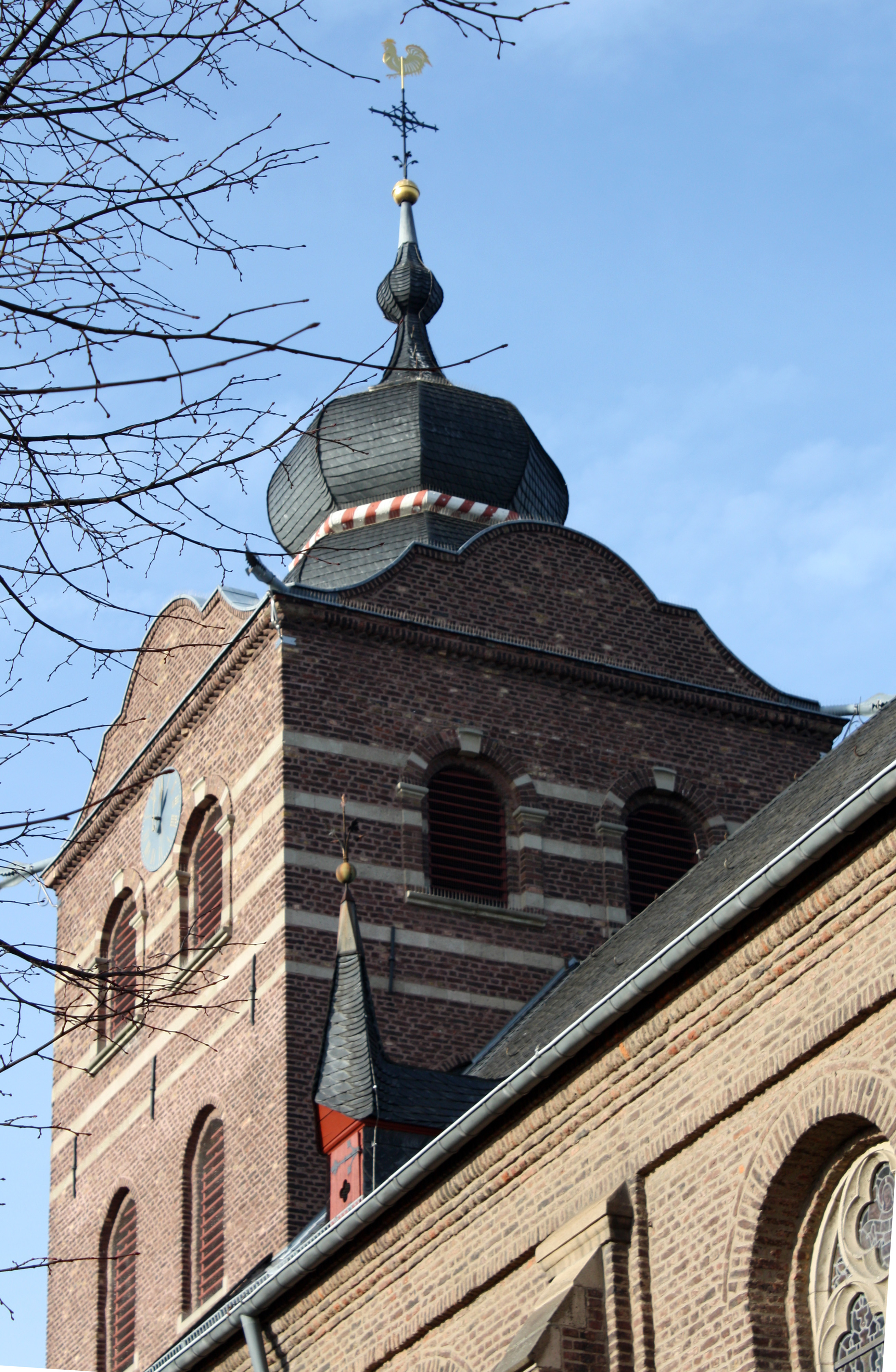 Erftstadt-Lechenich, St. Kilian. Zwiebelturm